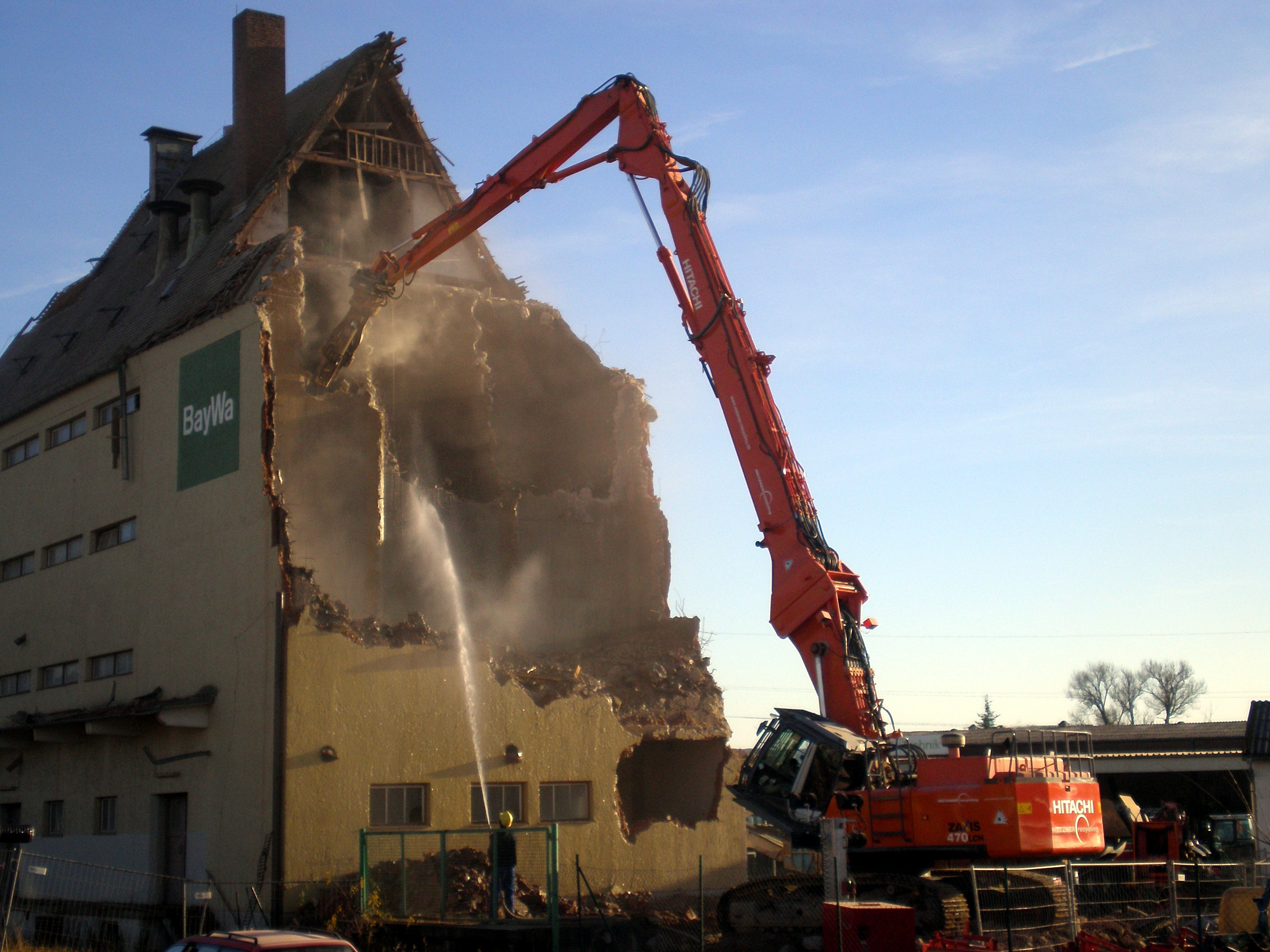 Abriss des 1961 erbauten Lagerhauses der BayWa in Burgkunstadt